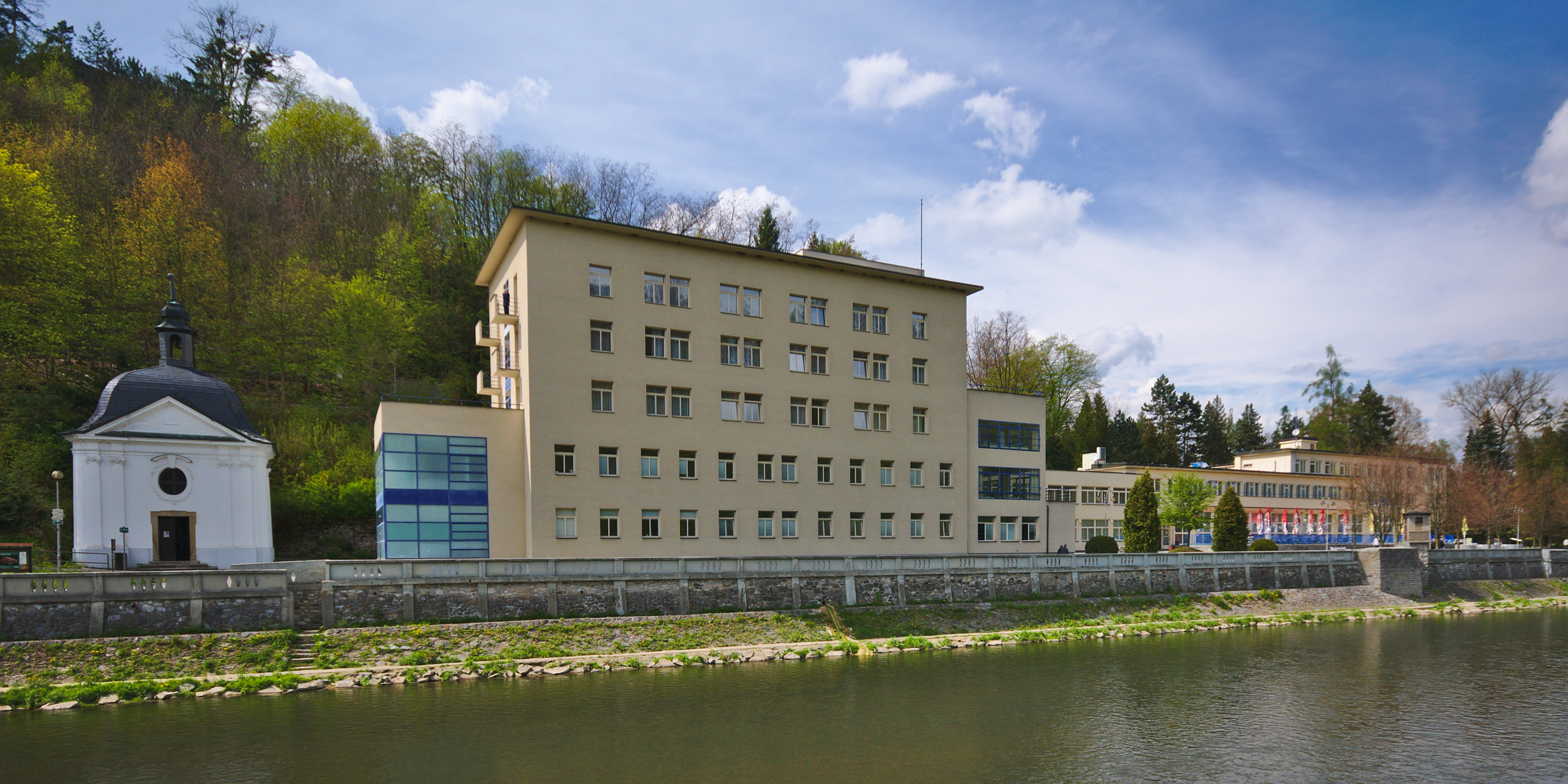 Lázeňský komplex, Teplice nad Bečvou, okres Přerov